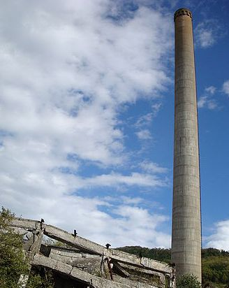 Красногорск, Сахалинская область, останки электростанции на севере (район Северный), шахты № 7 городского муниципалитета Тиннай, постройка конца 30-х годов XX века